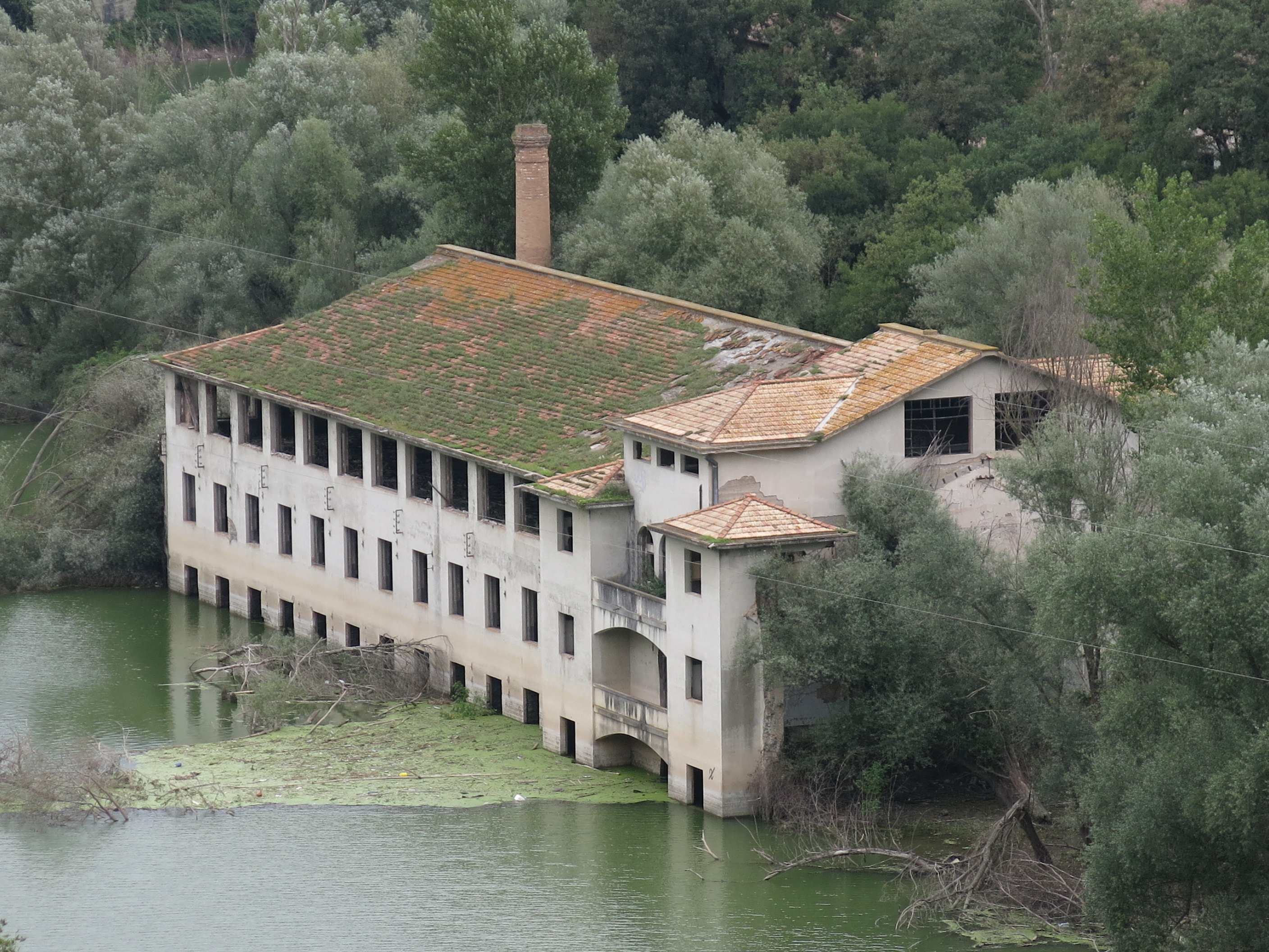 Fàbrica Salou-Baurier (les Masies de Roda)